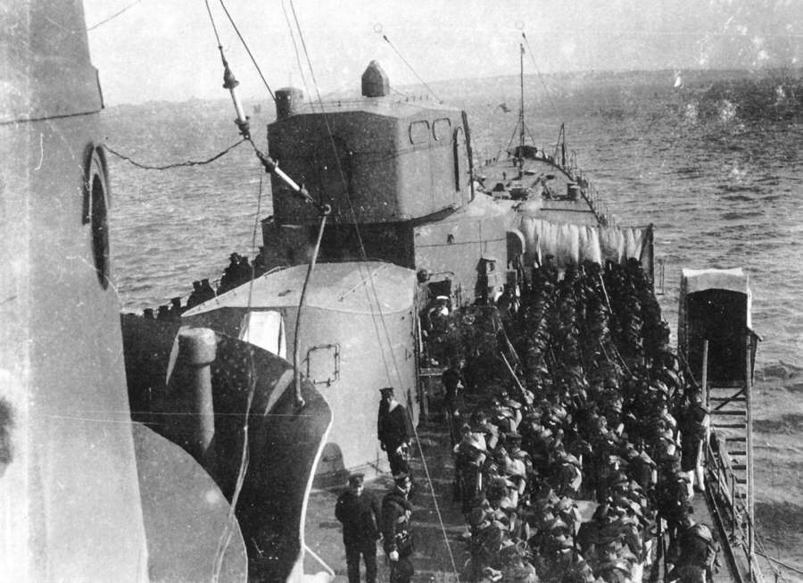 Группа трёх носовых башен на крейсере "Фурутака".